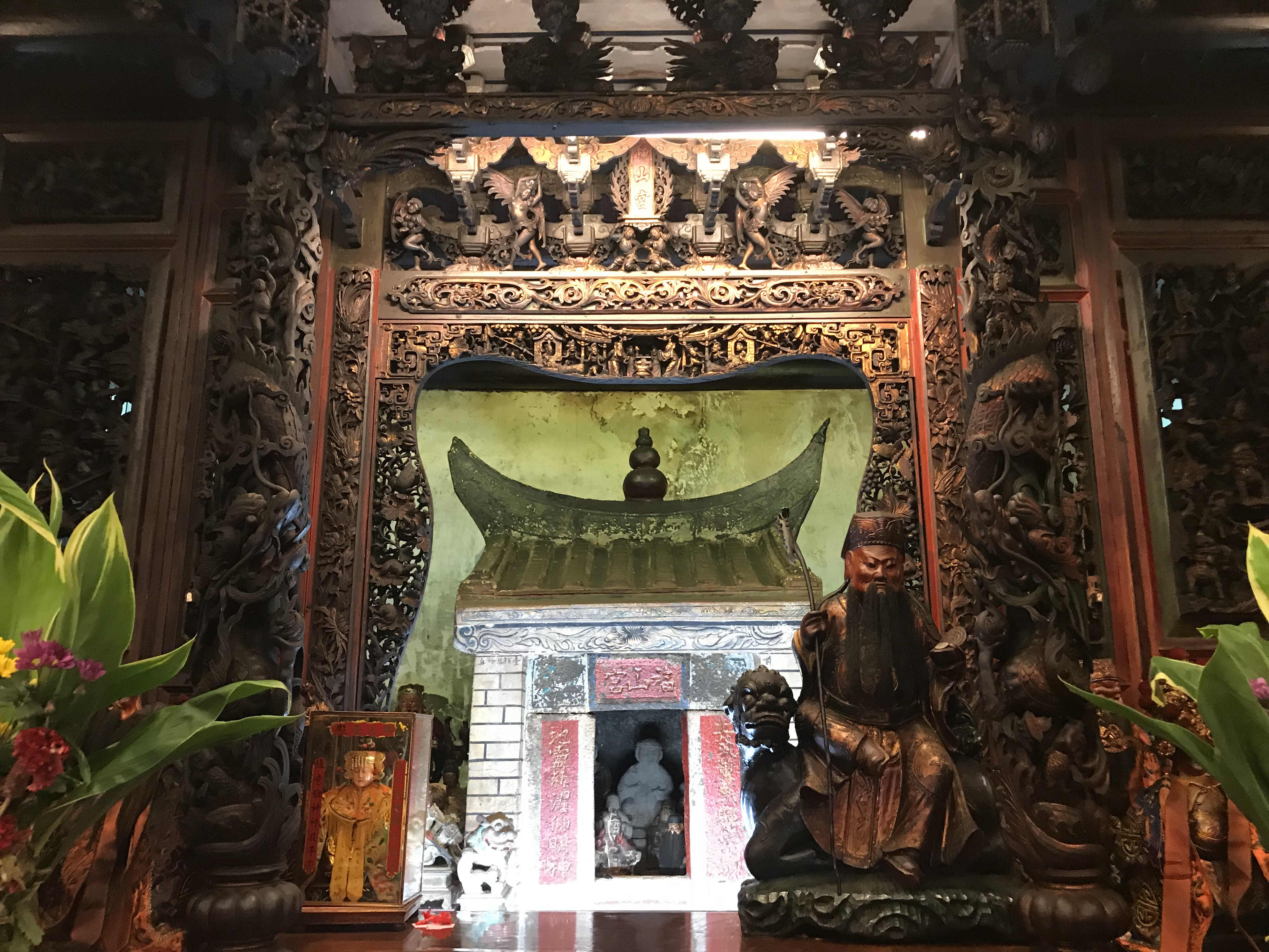 九份福山宮內部的小廟